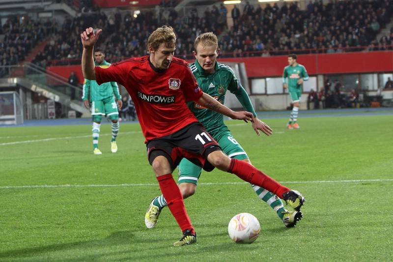 Stefan Kießling playing for Bayer Leverkusen.